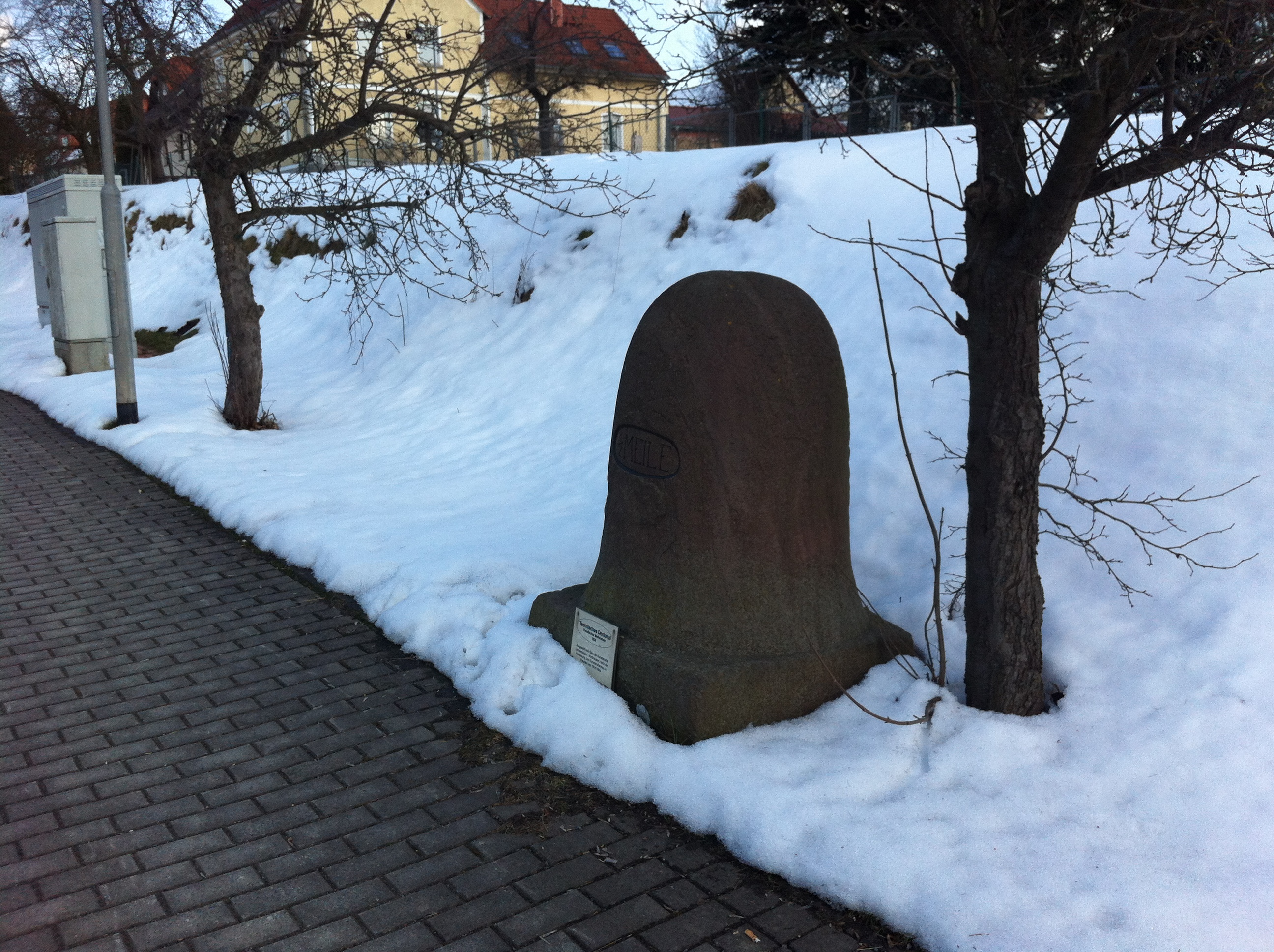 Preußischer Halbmeilenstein an der Bundesstraße 80 in Blankenheim. Früher verlief hier die Kunststraße von Langenbogen über Eisleben und Sangerghausen nach Nordhausen.